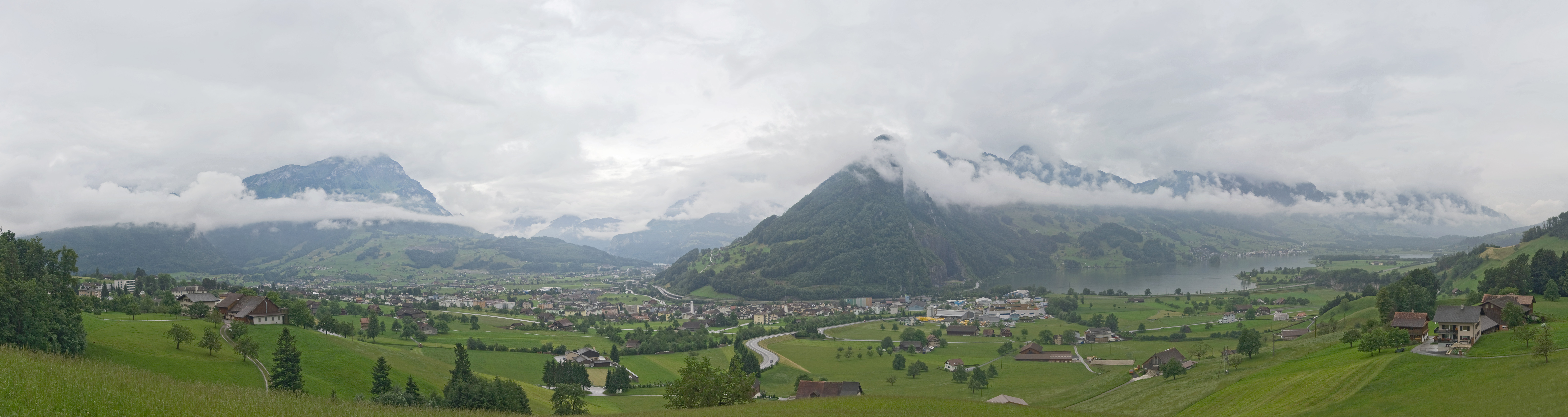 Schwyz Switzerland